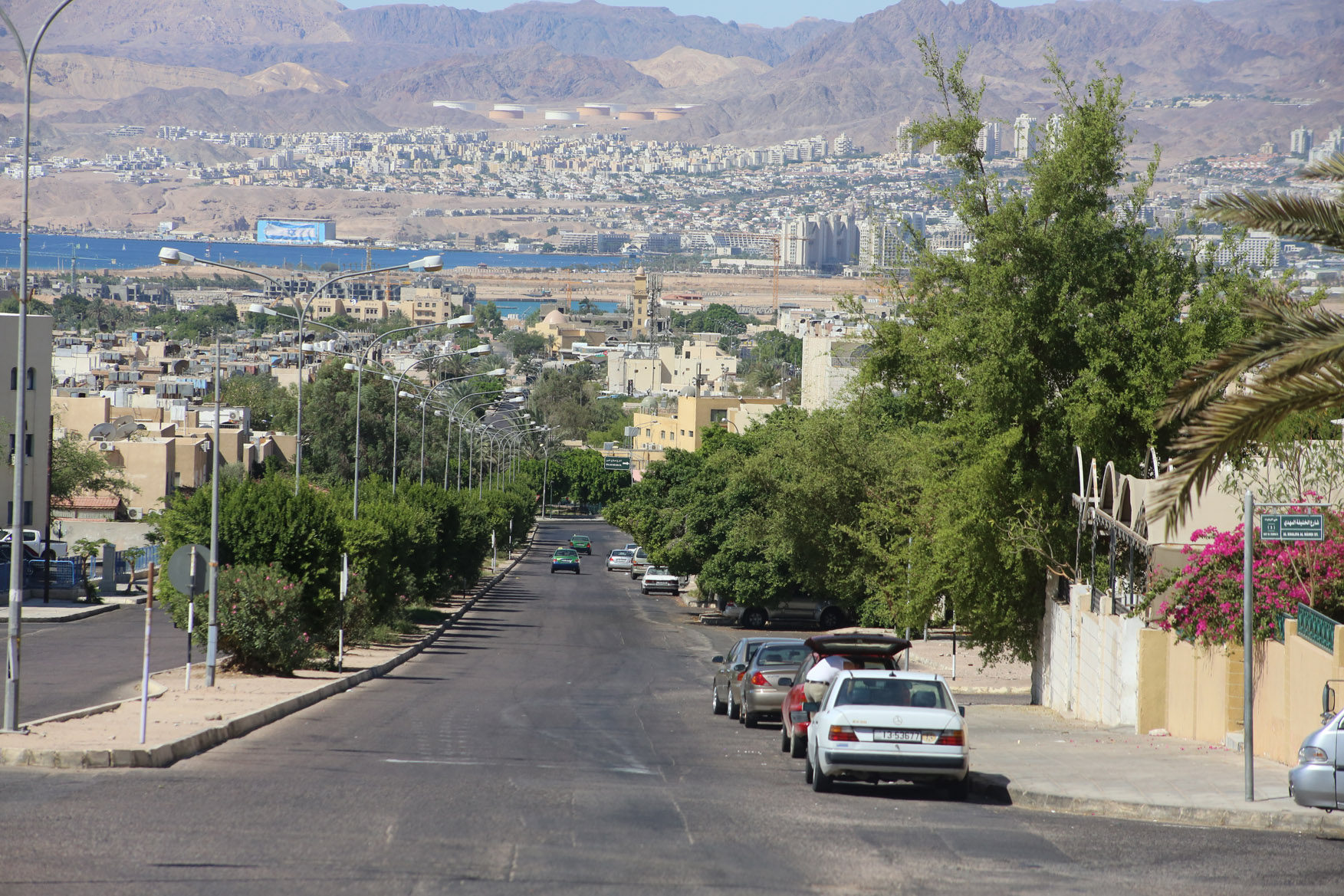 Aqaba, Jordan